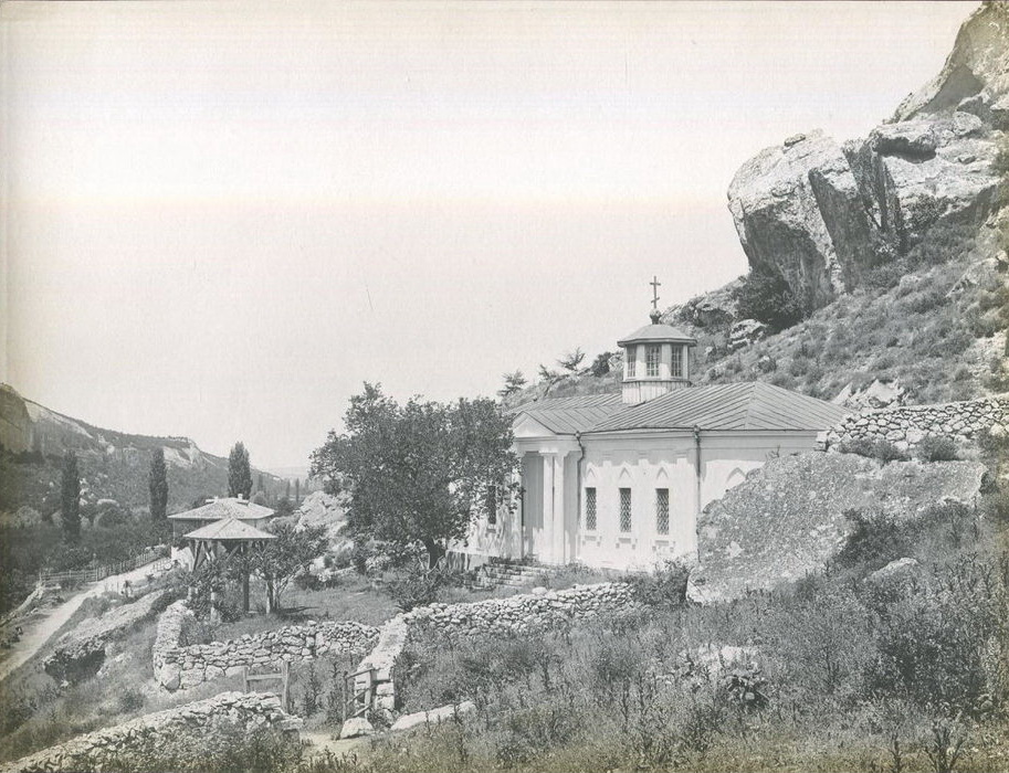 Монастырь св. Анастасии 1900 Таврическая губерния